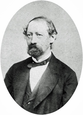 Hamburg,Tassilo von Heydebrand und der Lasa